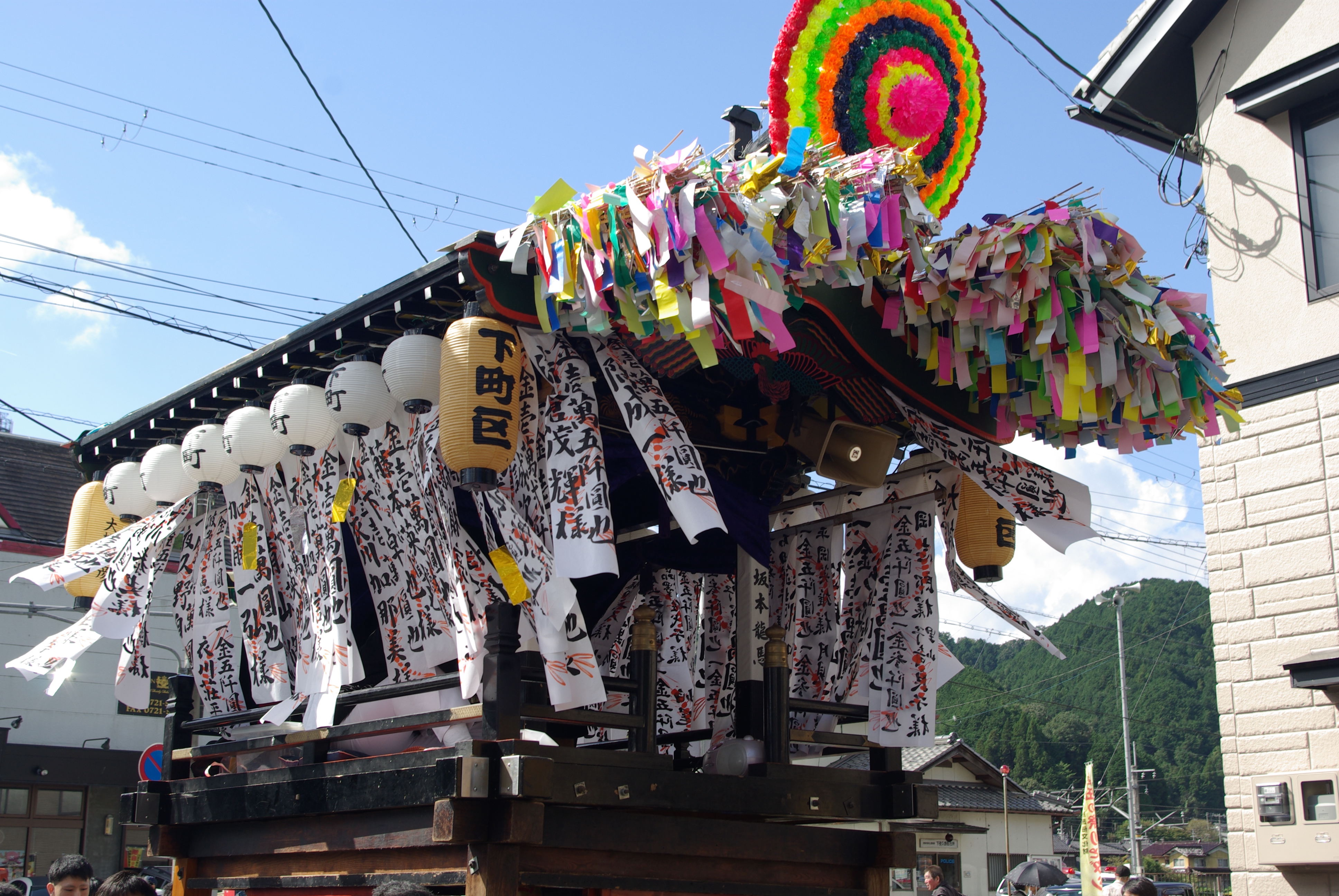 額田のダシ行事 神輿